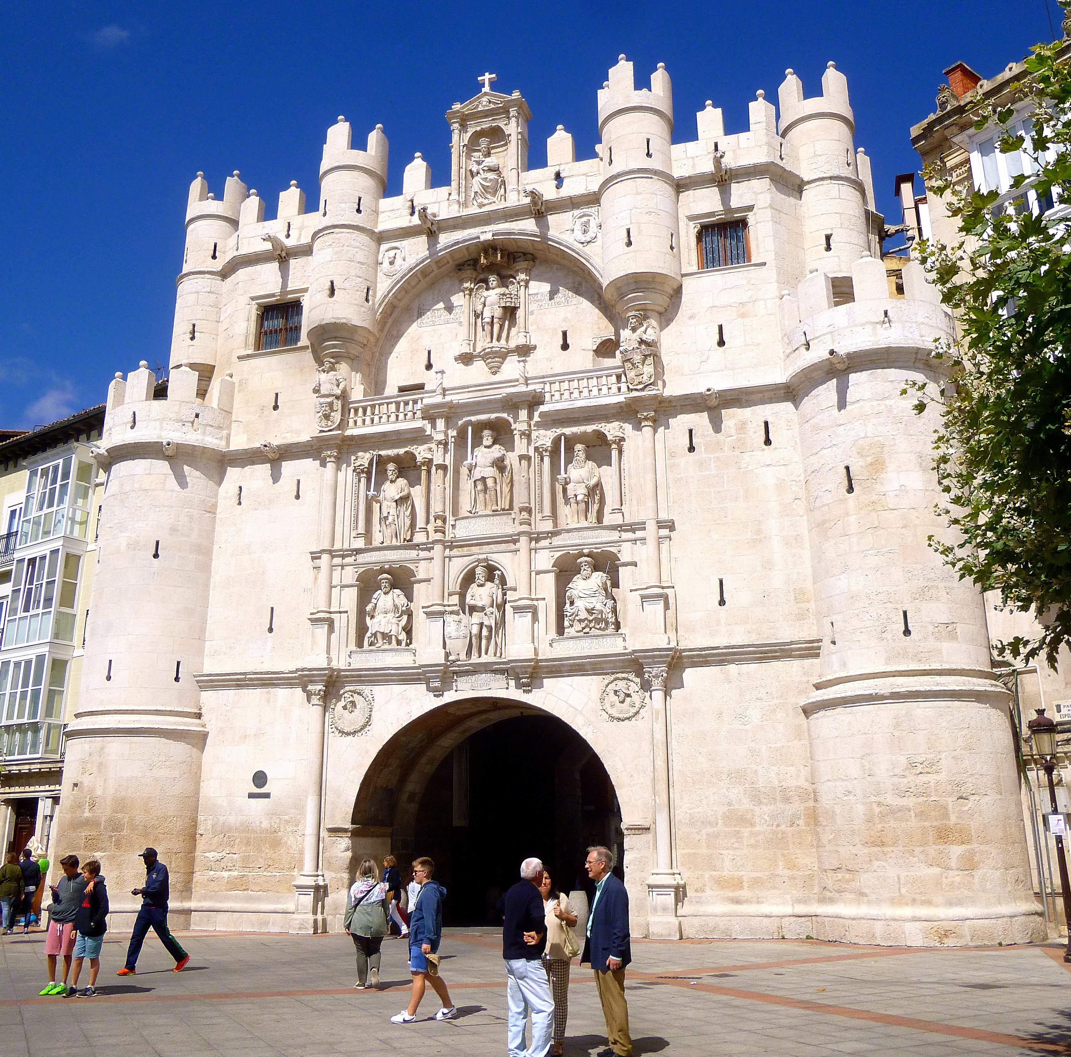 Burgos - Arco de Santa María